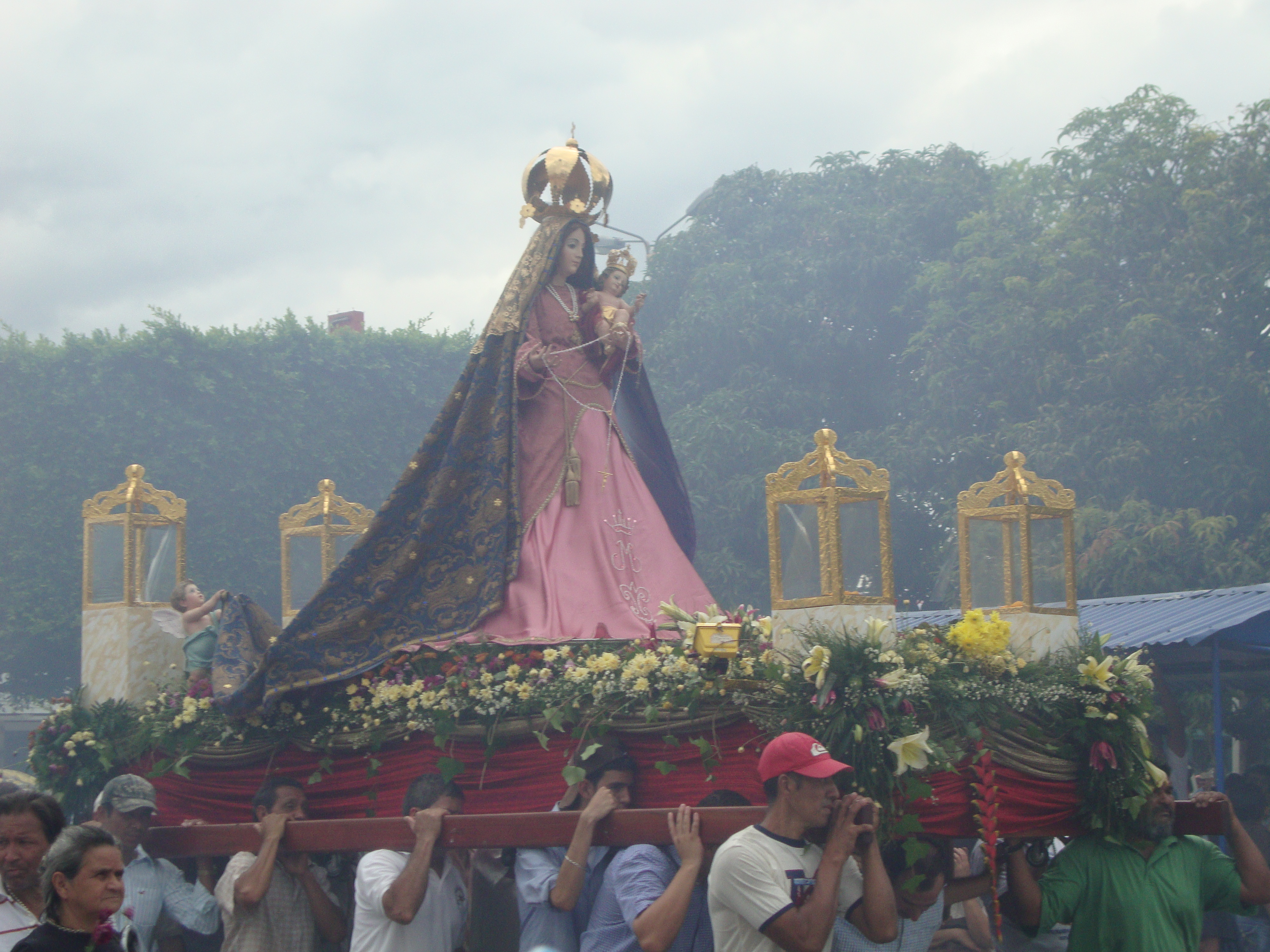 Patrona de la Diócesis, cargada por los feligreses